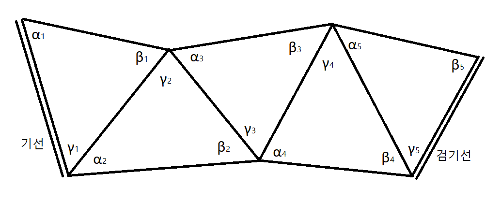 단열 삼각망